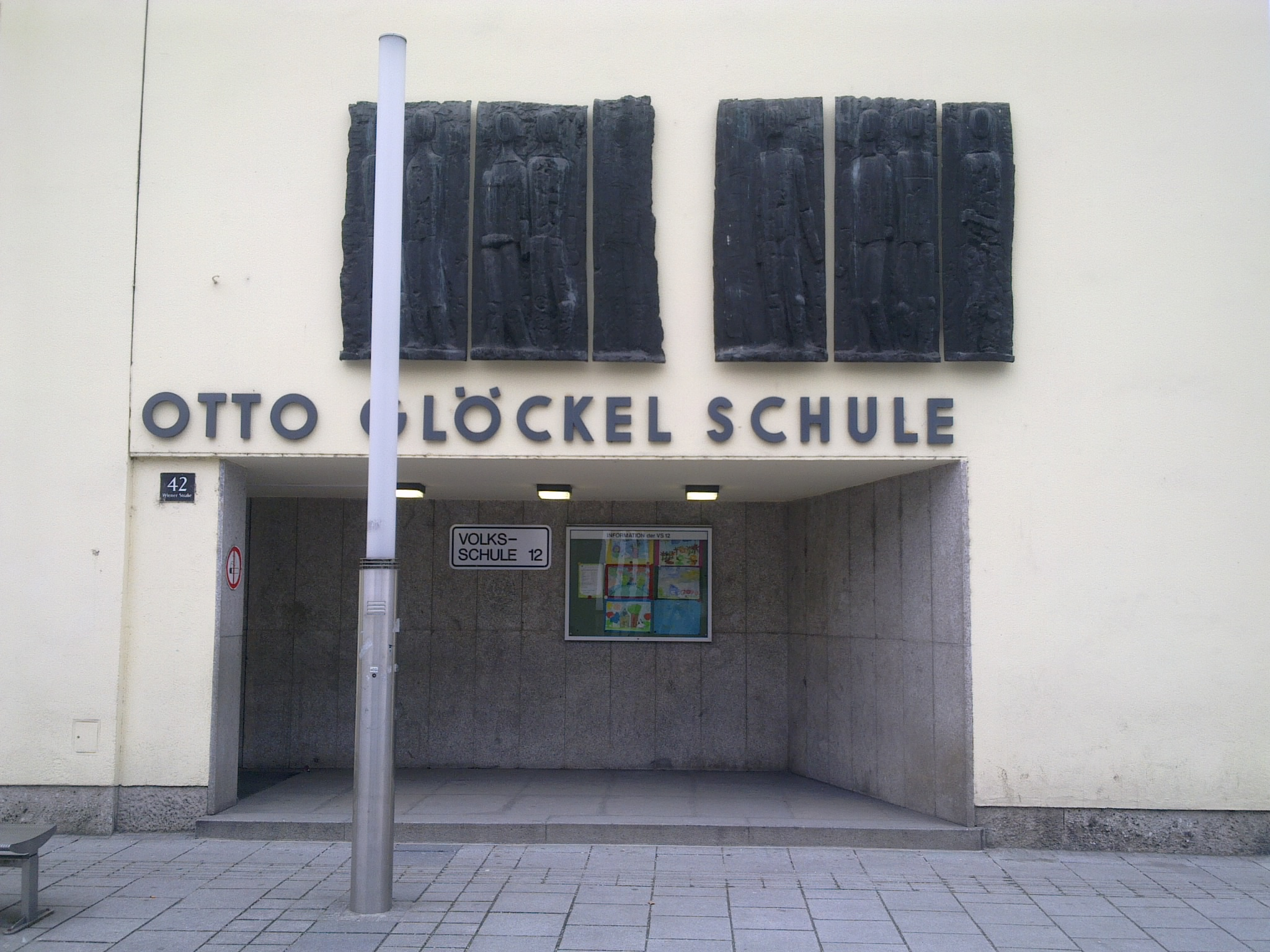 Auf diesem Foto ist die Ansicht von der Wienerstraße zu sehen. Darauf befindet sich der Haupteingang zur Volksschule. Über diesem hängt ein Bronzerelief mit dem Thema "Mensch" von Fritz Wotruba, welches 1955 aufgestellt worden ist.